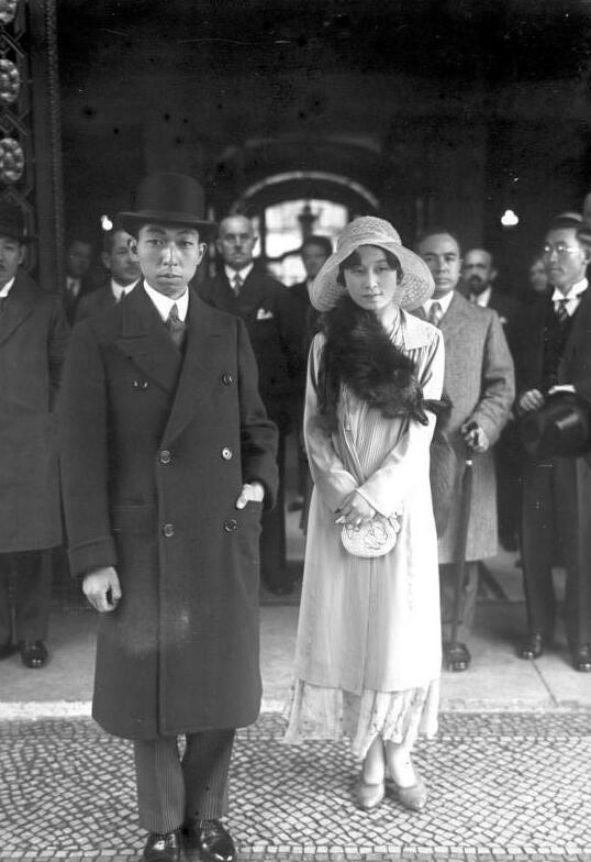 Der Bruder des Kaisers von Japan in Berlin! Prinz Takamatsu traf mit seiner Gattin zu einem inoffiziellen Besuch in Berlin ein. Unser Bild zeigt das Paar vor dem Hotel Adlon in Berlin.